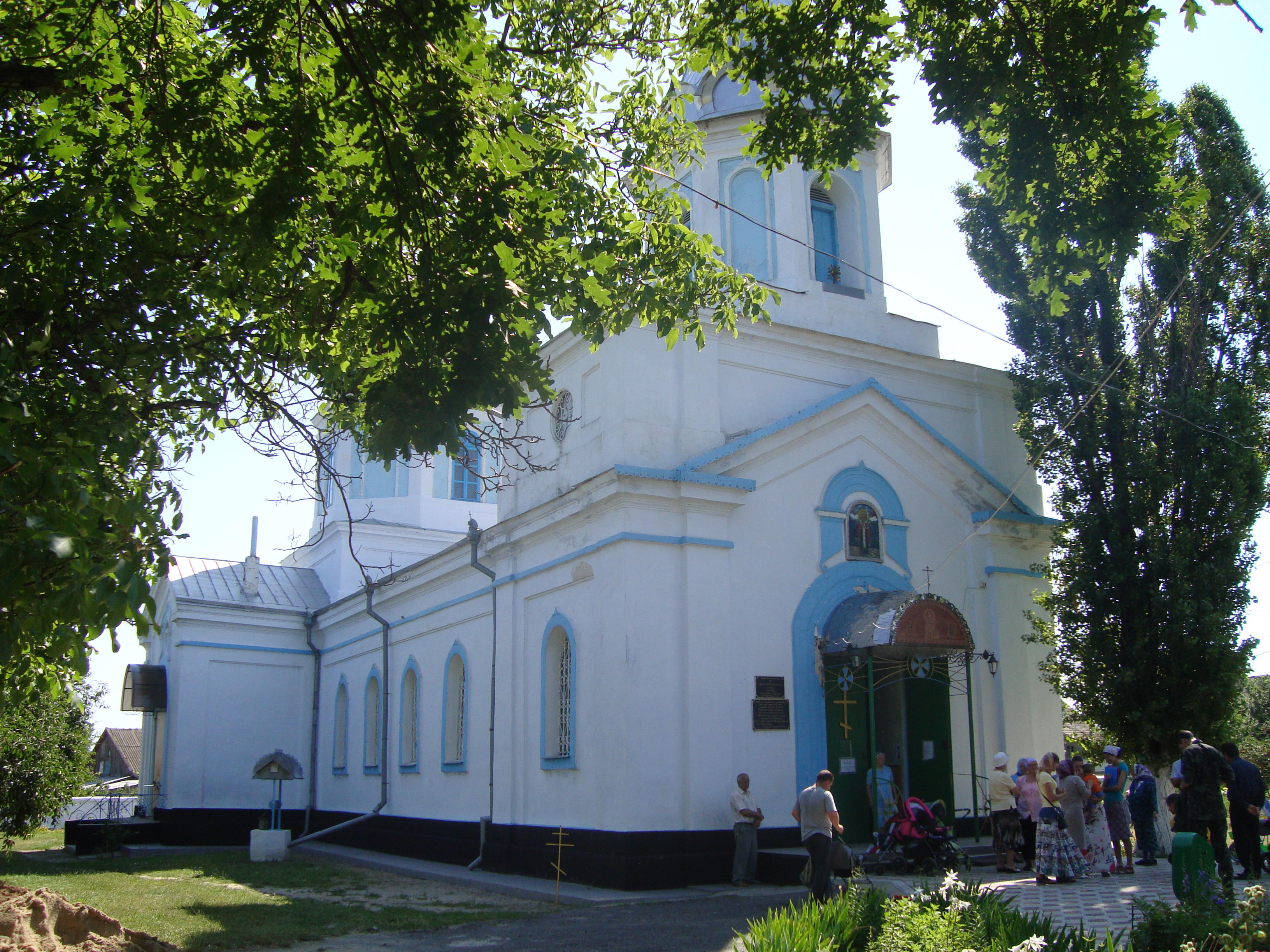 Свято-Миколаївська церква, с. Шабо. 1805р.